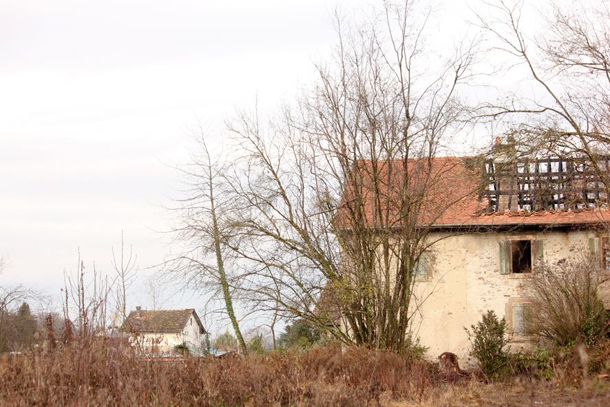 L'historique ferme Léonie Castelli à Bonnatrait, Sciez, au lieu-dit Les Praz Lyonie (arpitan savoyard pour "Les Prés Léonie").